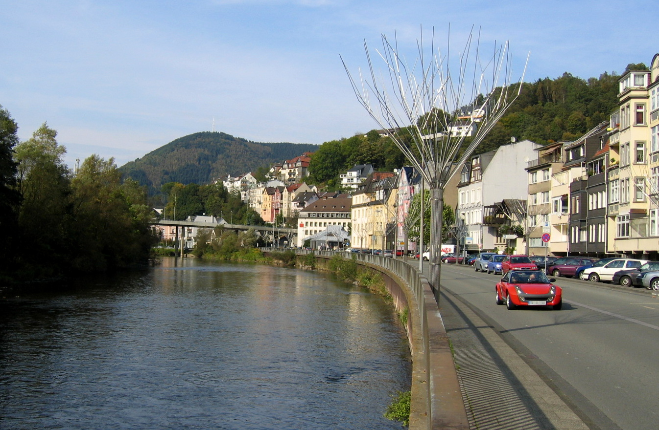 Description: Lenneufer im Zentrum von Altena mit dem Kunstobjekt Drahtbaumallee der Brüder Berthold, aus dem Jahr 2004. Source: selbst fotografiert Date: 9. Okt. 2005 Author: Asio otus